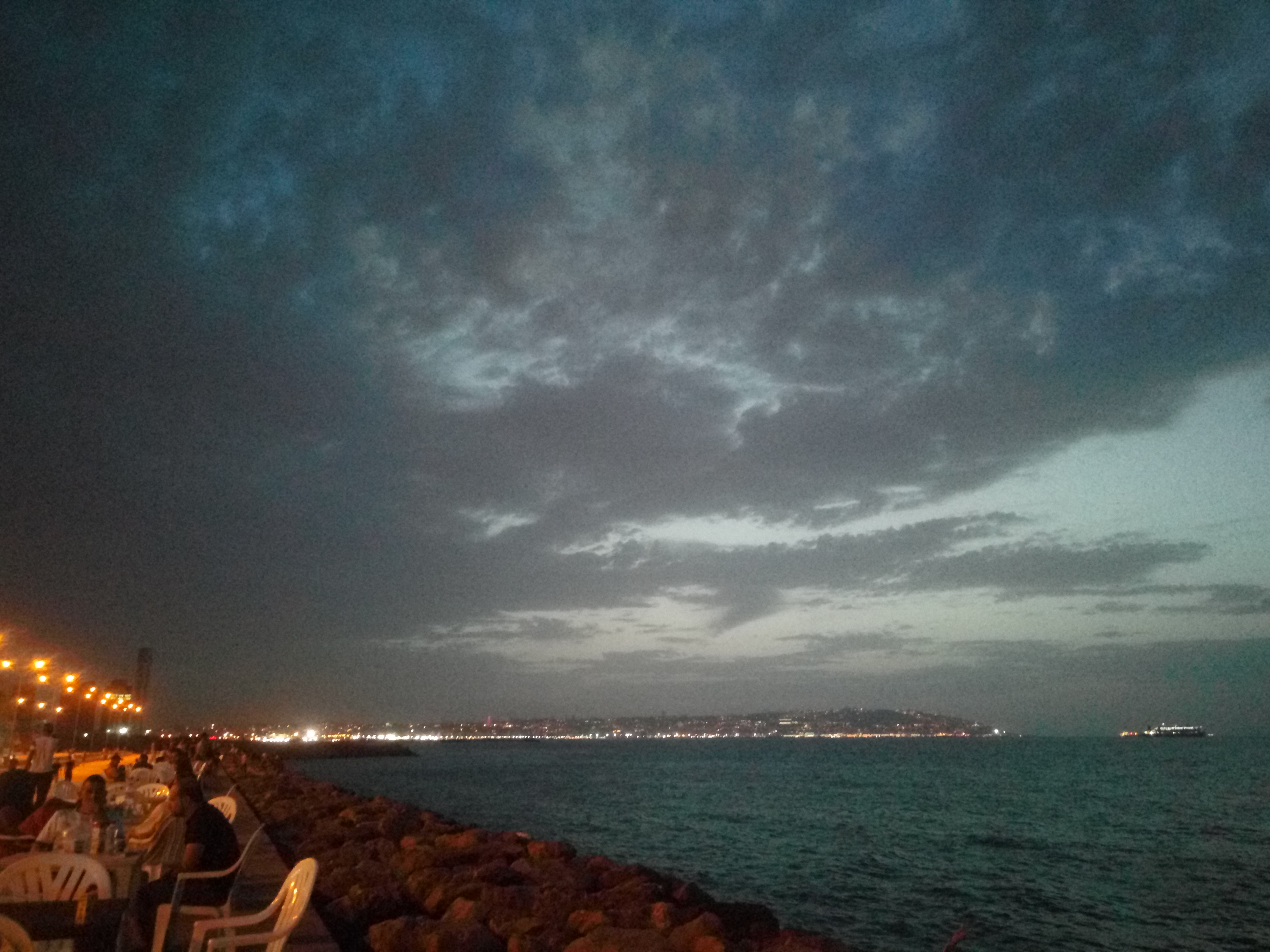 Vue sur Alger depuis la plage du Lido.